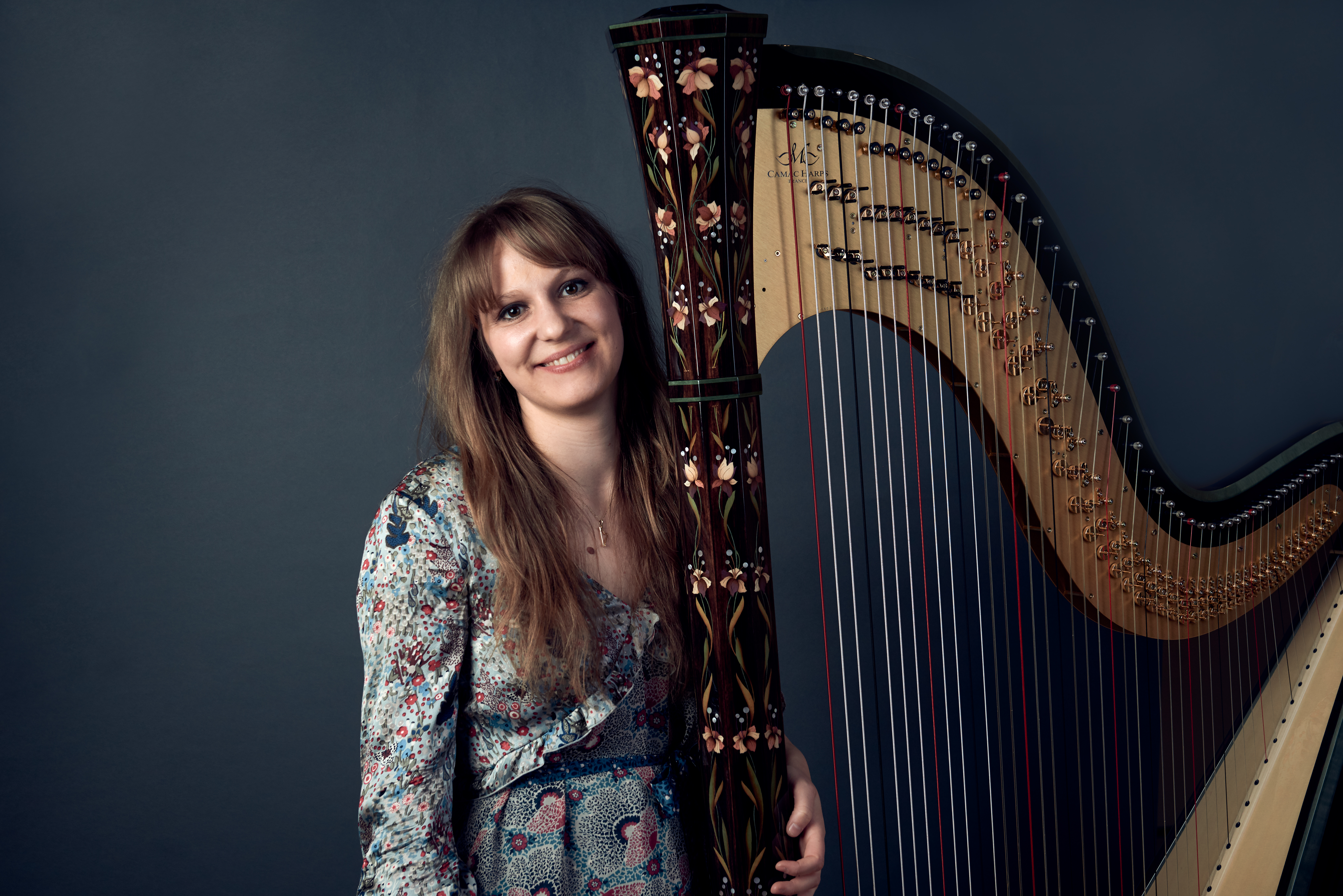 Barbora Plachá, harfistka